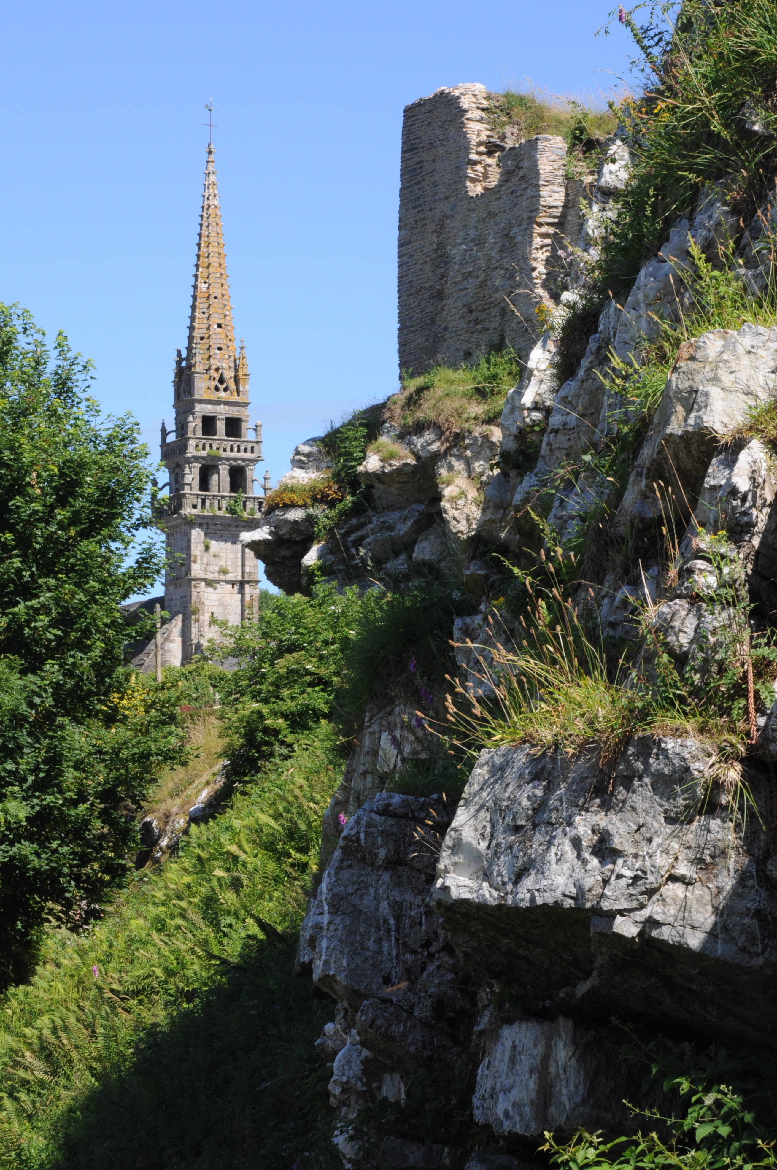 Clocher de l'église Saint Yves, vu depuis les ruines du chateau "Roc'h Morvan" ancienne forteresse du vicomté du Léon-LA ROCHE-MAURICE